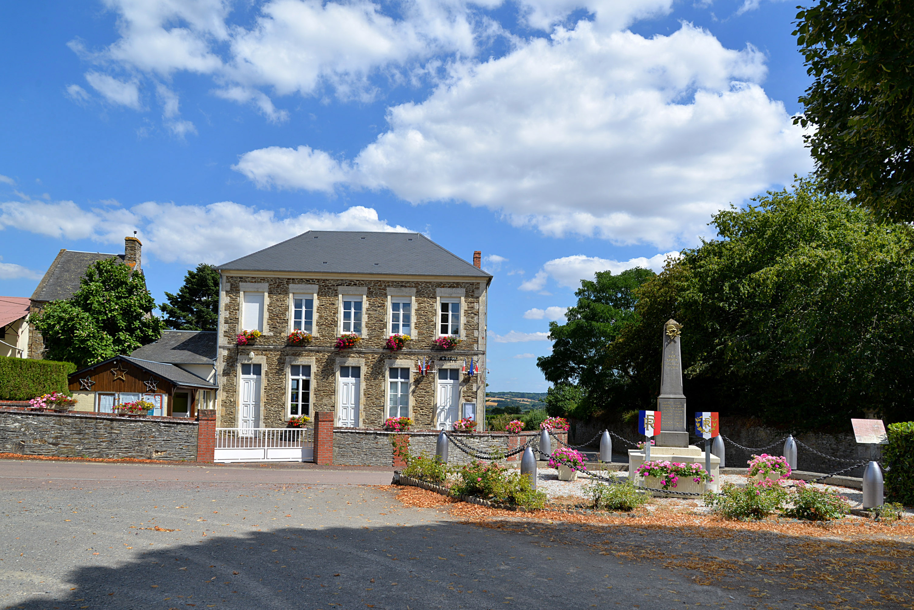 Ouffières (14)